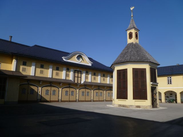 Rochushof (Rochuskaserne) mit Kapelle des hl. Rochus